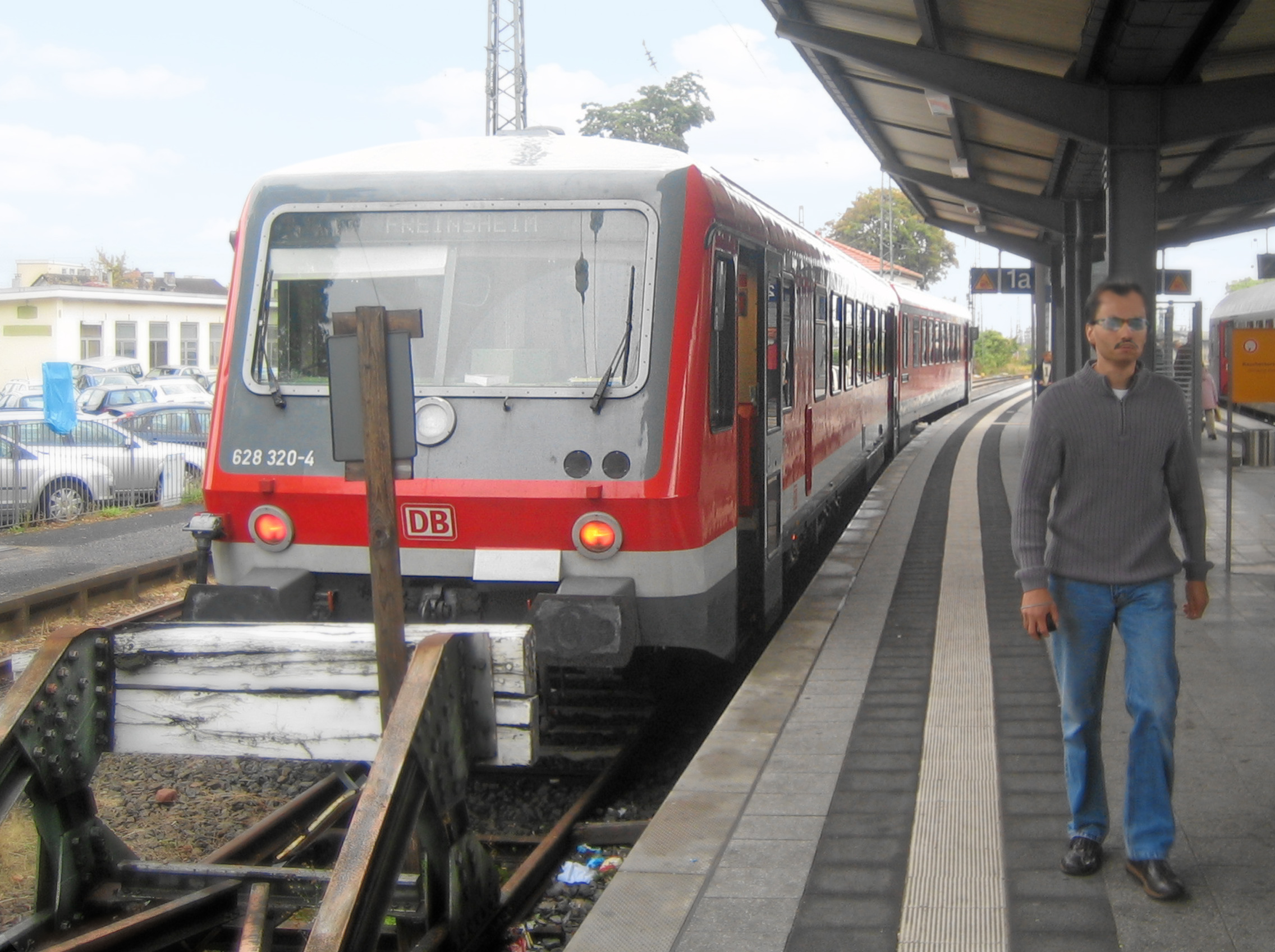 Zug der Pfälzischen Nordbahn im Hbf. von Neustadt/Weinstr., selbst fotografiert